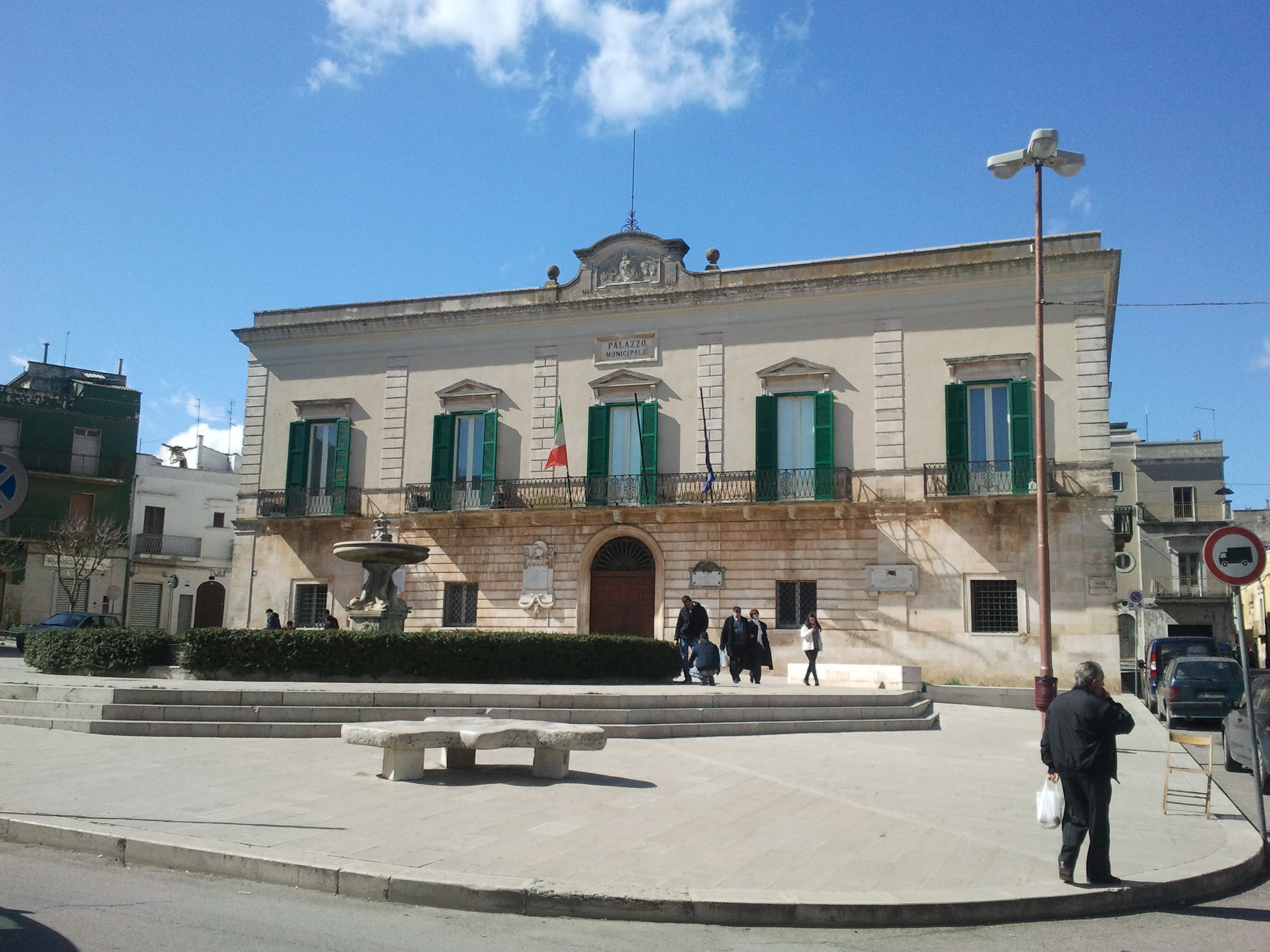 Piazza Giuseppe Simone o Piazza Municipio - Santeramo in Colle